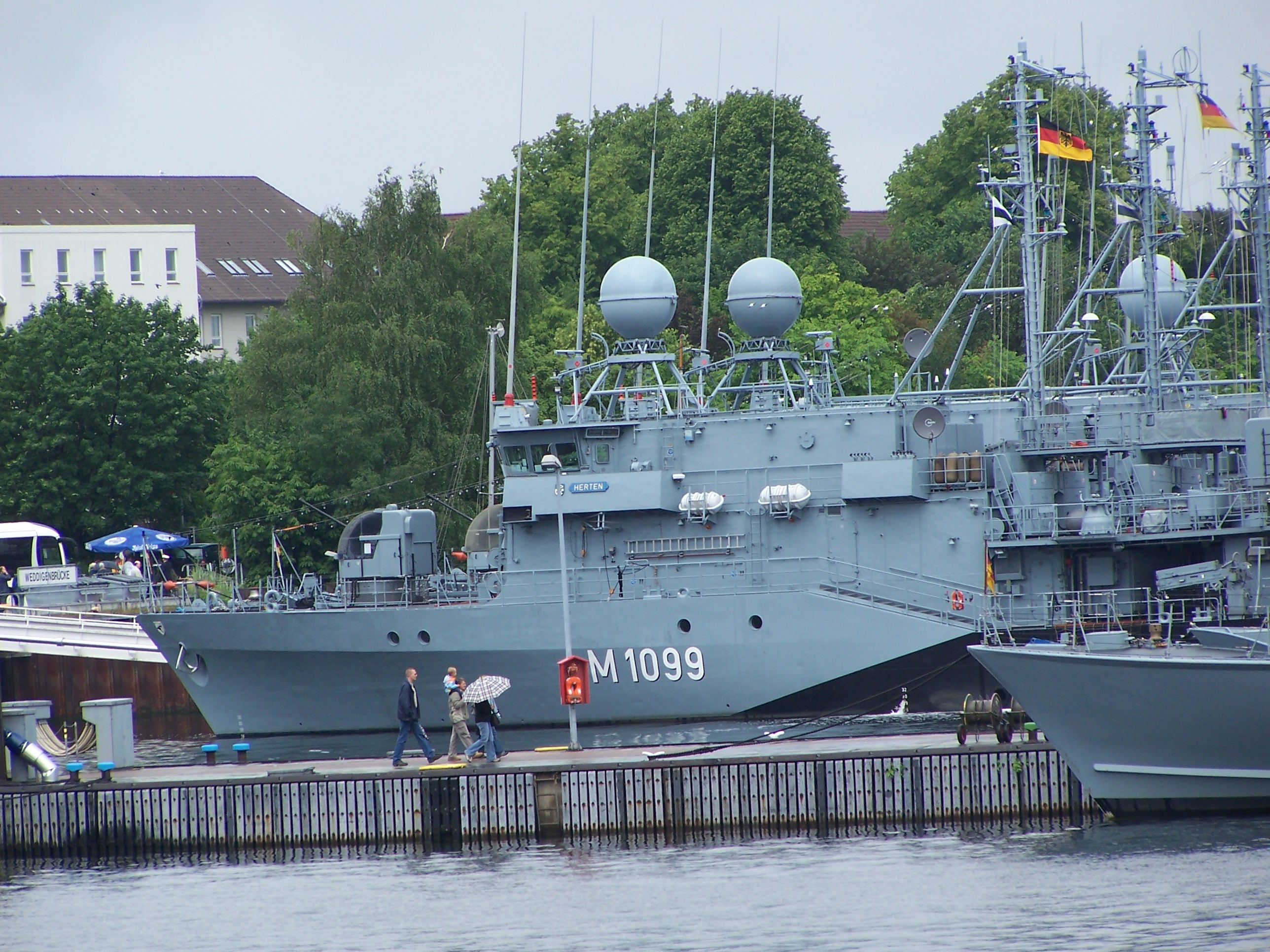 Minenjagdboot "Herten" M1099 - Kulmbach-Klasse. Fotografiert während der Kieler Woche 2007